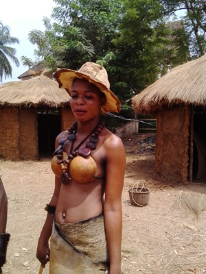 Une danseuse s'apprêtant lors du festival culturel Mbam'Art, édition 2015. This is an image with the theme "Play" from: Cameroon